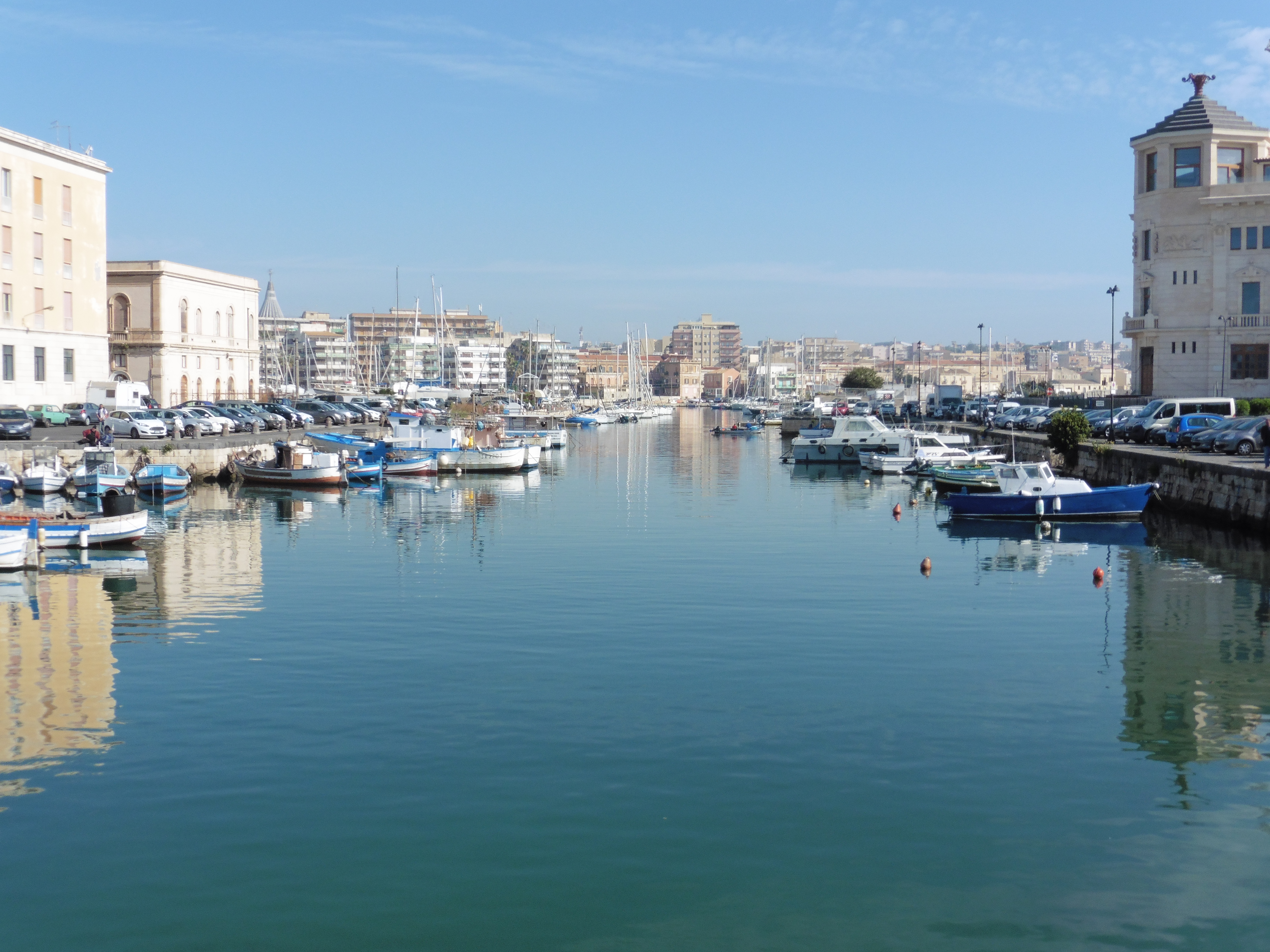 Canale che separa Ortigia dalla terraferma